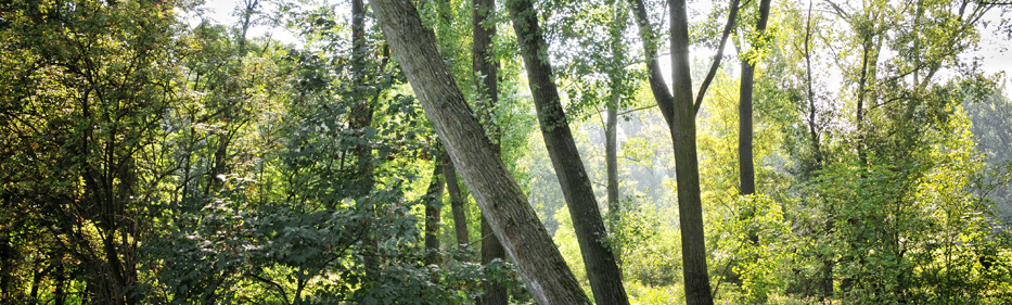 Siegaue Grünes C